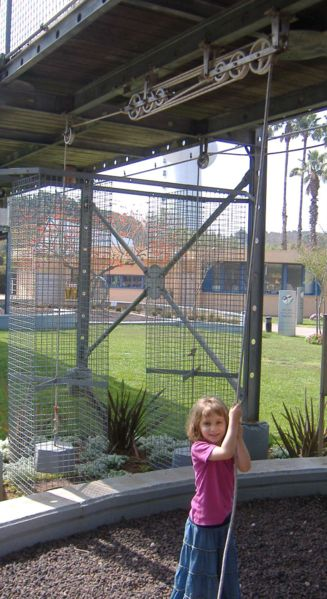 Pulleys. taken by he:משתמש:עוזי ו.